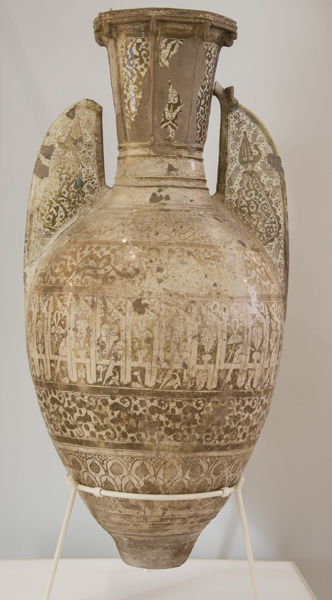 Jarrones de la Alhambra (Reino Nazarí de Granada). Número de inventario: 1930-67.